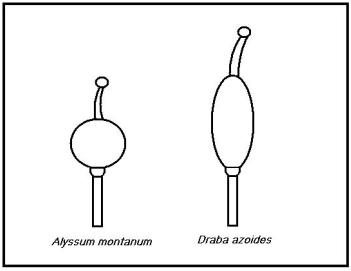 Differenze nella forma delle siliquette tra Alyssum montanum e Draba aizoides.